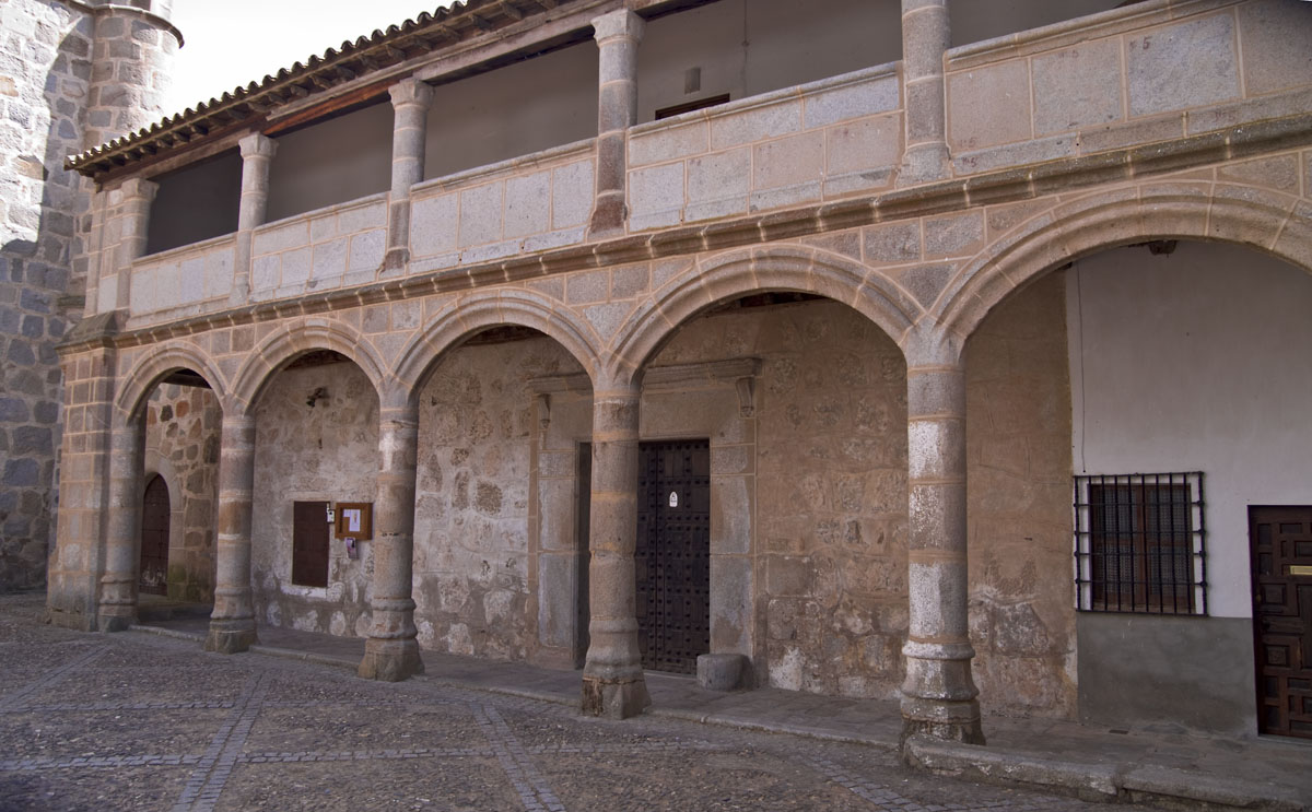 Convento de Santa Clara de Belalcazar